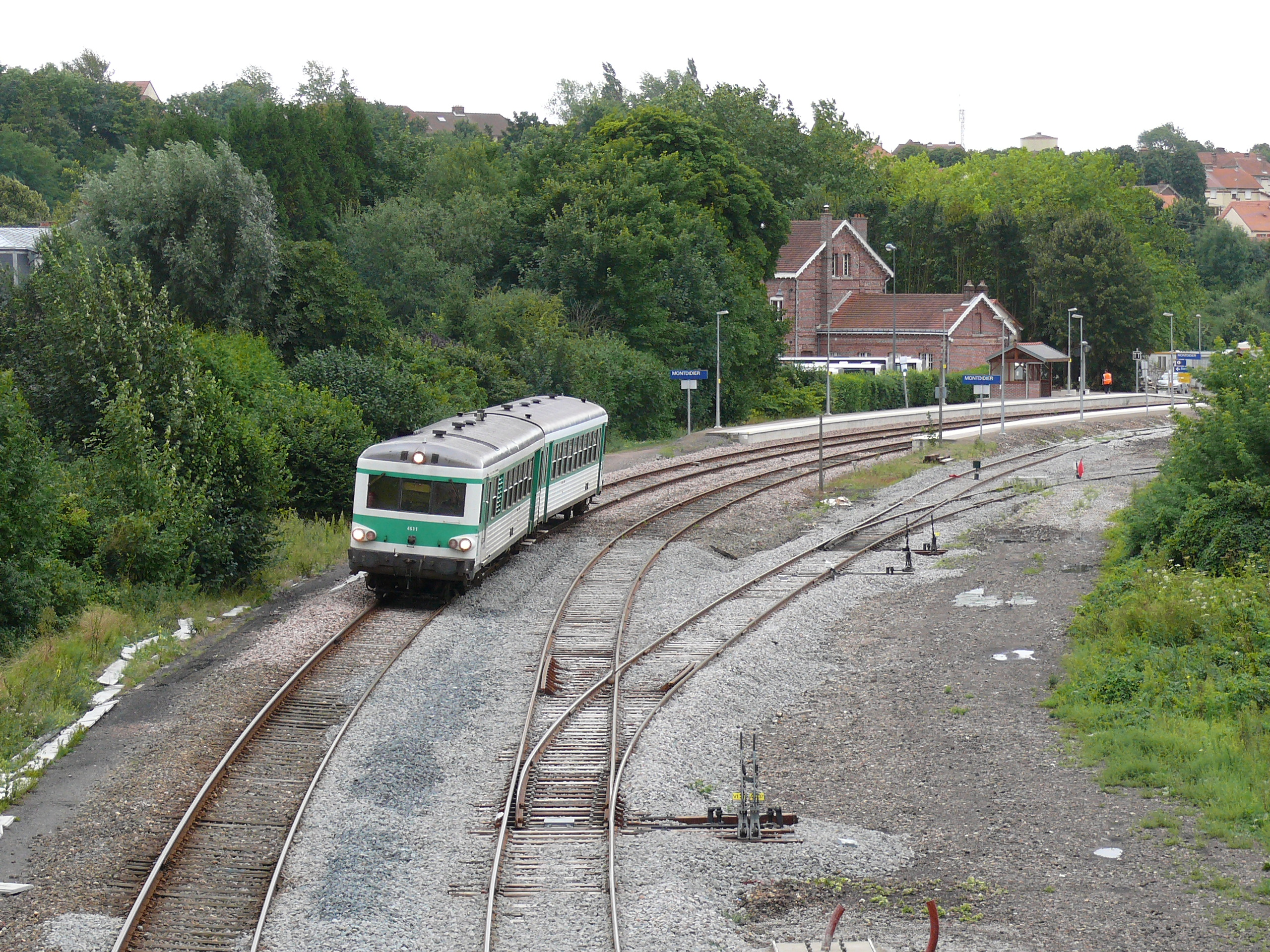 La gare de Montdidier vue depuis le pont de la RD 930 pendant le chantier de modernisation de la voie entre Montdidier et Compiègne